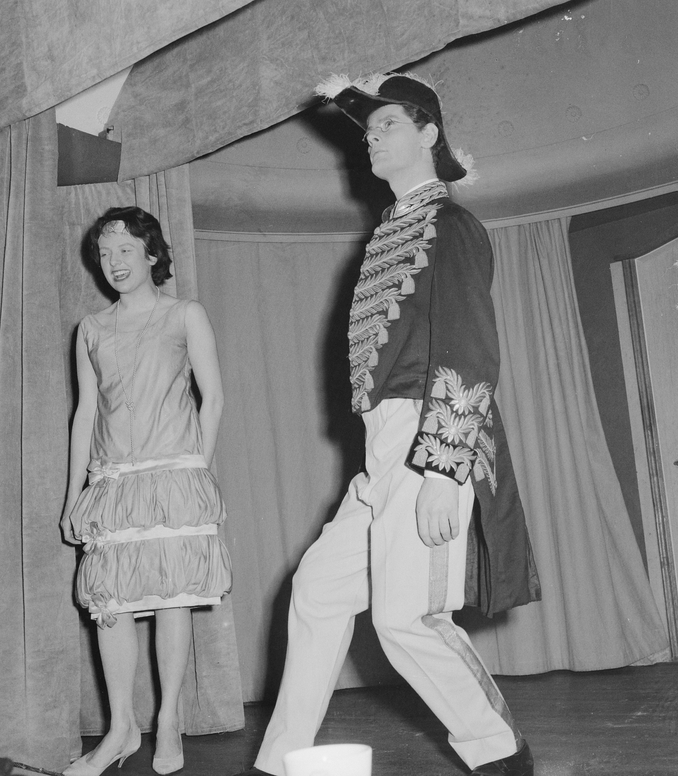 Collectie / Archief : Fotocollectie Anefo Reportage / Serie : [ onbekend ] Beschrijving : TV Leidsepleincabaret "Alle gekken kijken", links Marjan Berk en rechts Aart Bouwmeester (imitatie De Quay ) Datum : 15 december 1959 Locatie : Amsterdam, Noord-Holland Trefwoorden : cabaret, cabaretiers, televisie Persoonsnaam : Berk, Marjan, Bouwmeester, Aart Fotograaf : Pot, Harry / Anefo Auteursrechthebbende : Nationaal Archief Materiaalsoort : Negatief (zwart/wit) Nummer archiefinventaris : bekijk toegang 2.24.01.03 Bestanddeelnummer : 910-8814